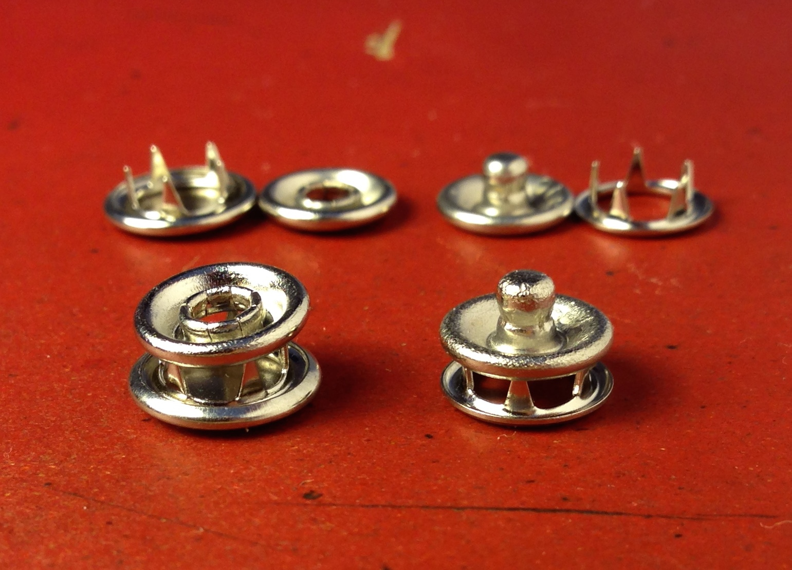 Patentky, dvě dvoudílné části rozložené a přiložené k sobě bez vložení látky.